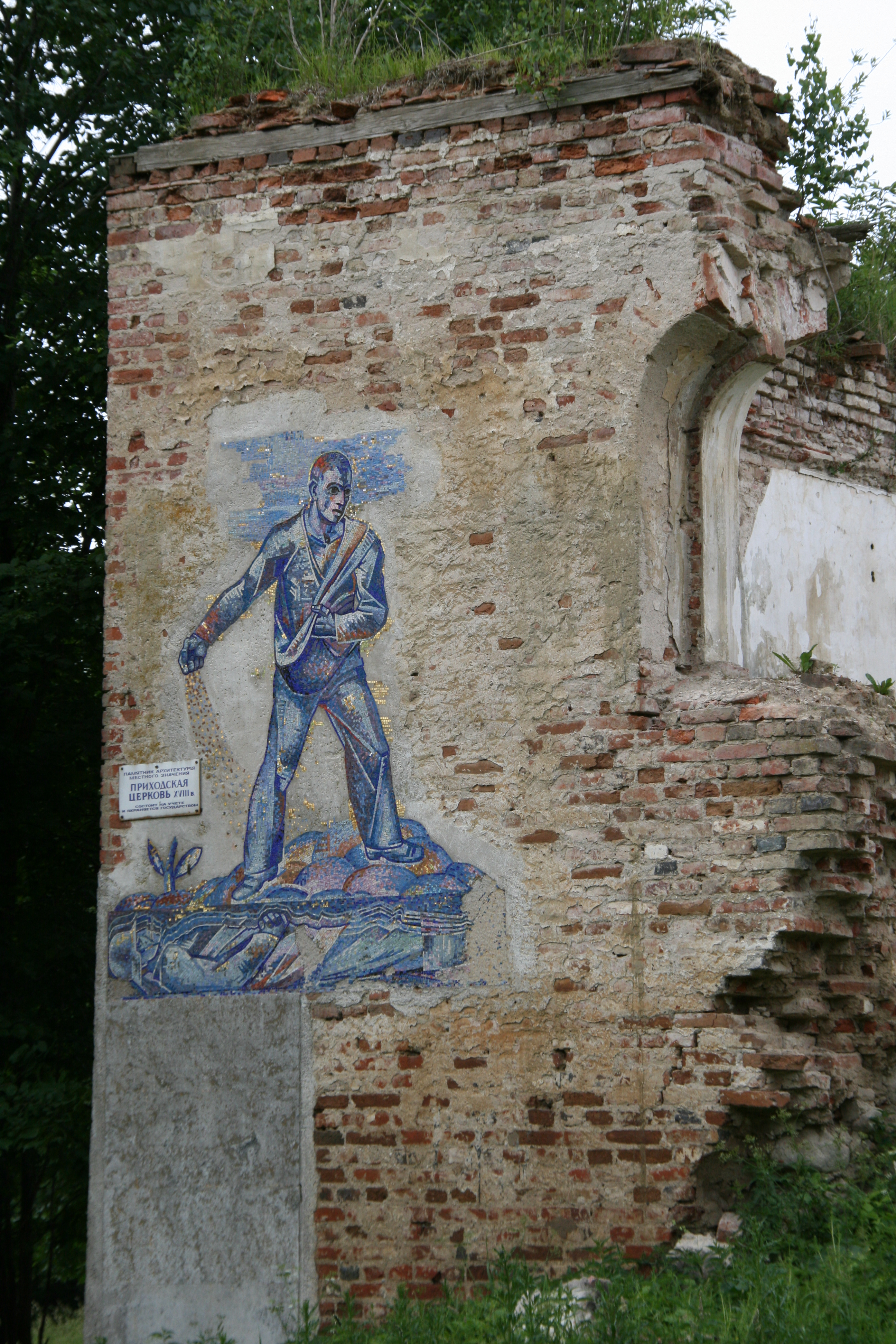 Приходская церковь: Зеленополье, Гурьевский район, Калининградская область